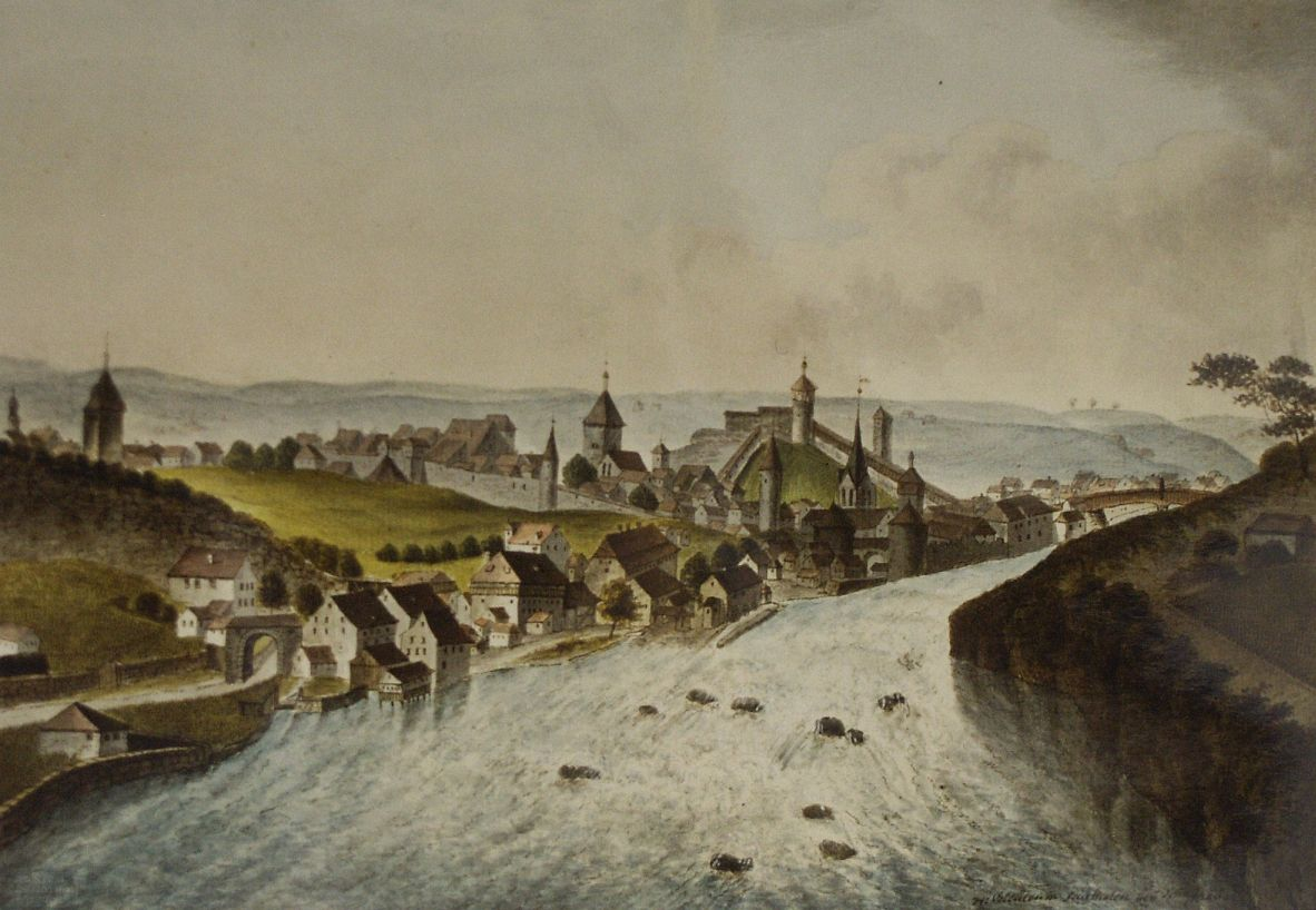 Darstellung: Ansicht aus Südwesten Original in der ZB Zürich, Grafische Sammlung Dia Nr. 275